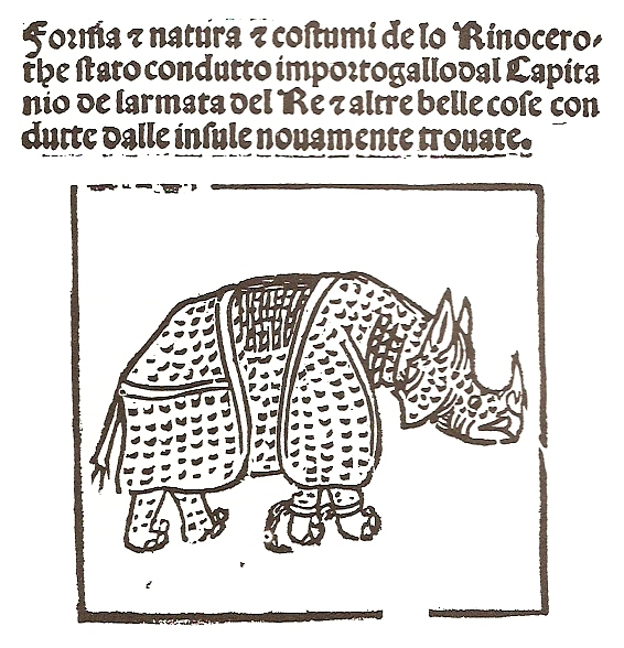 Author - Giovanni Giacomo Penni Source - Poemetto "La Forma .... Rhinocerote..." - Bibliotecha Colombina - Spain Date - 1515